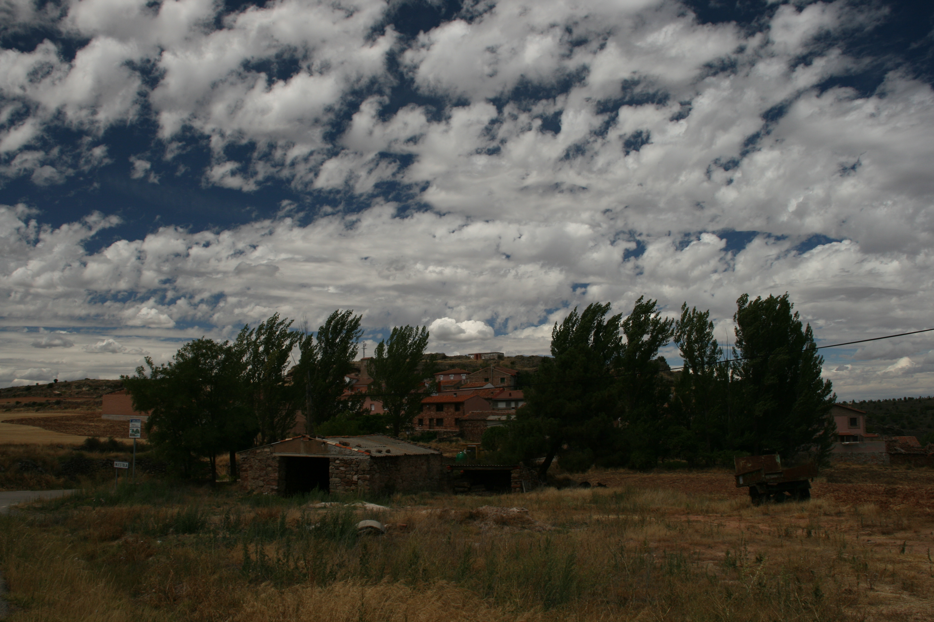 Inisestola, provincia de Guadalajara, España